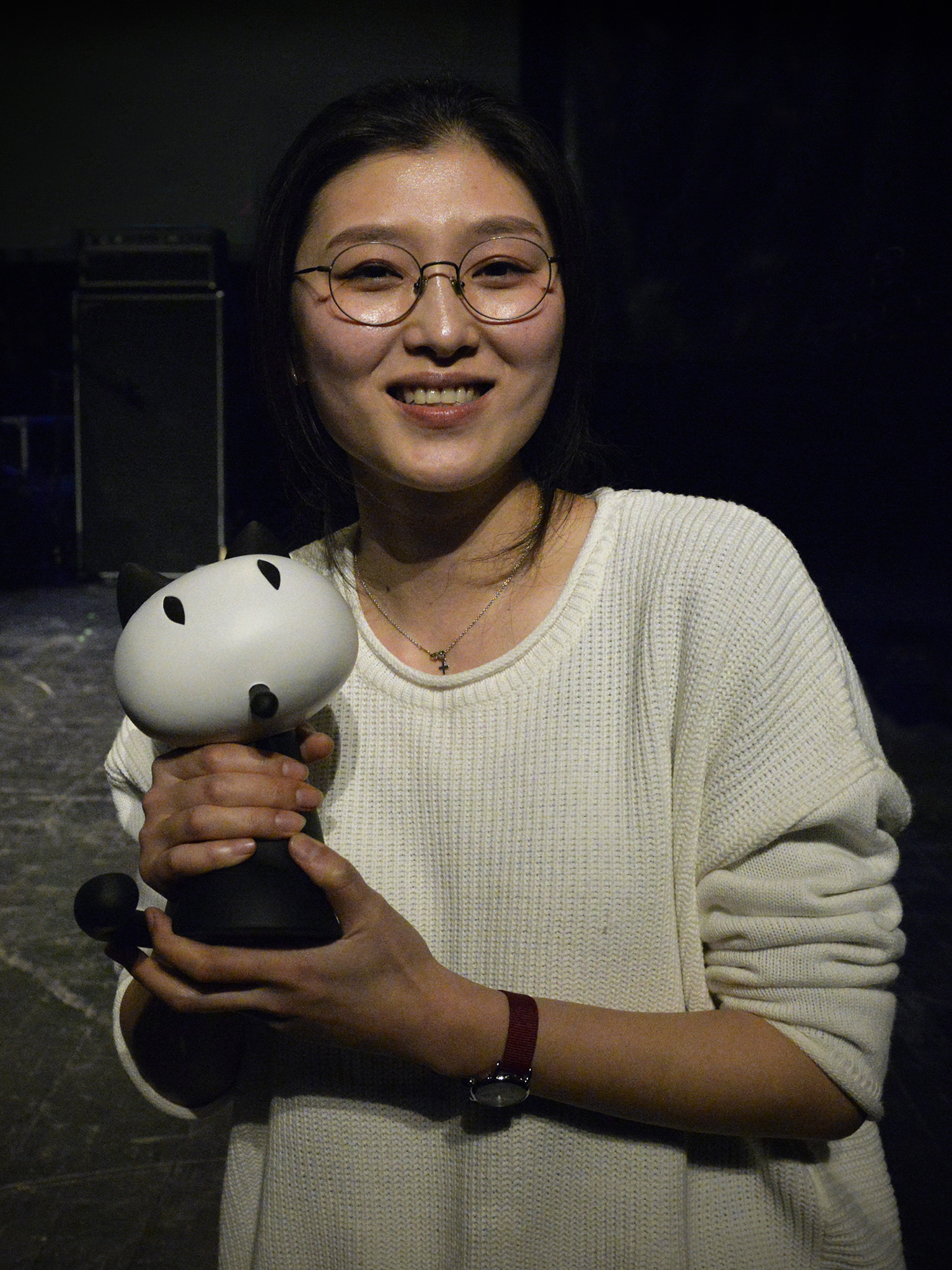 Ancco et le Fauve du prix révélation au Festival International de la Bande Dessinée d'Angoulême 2017.